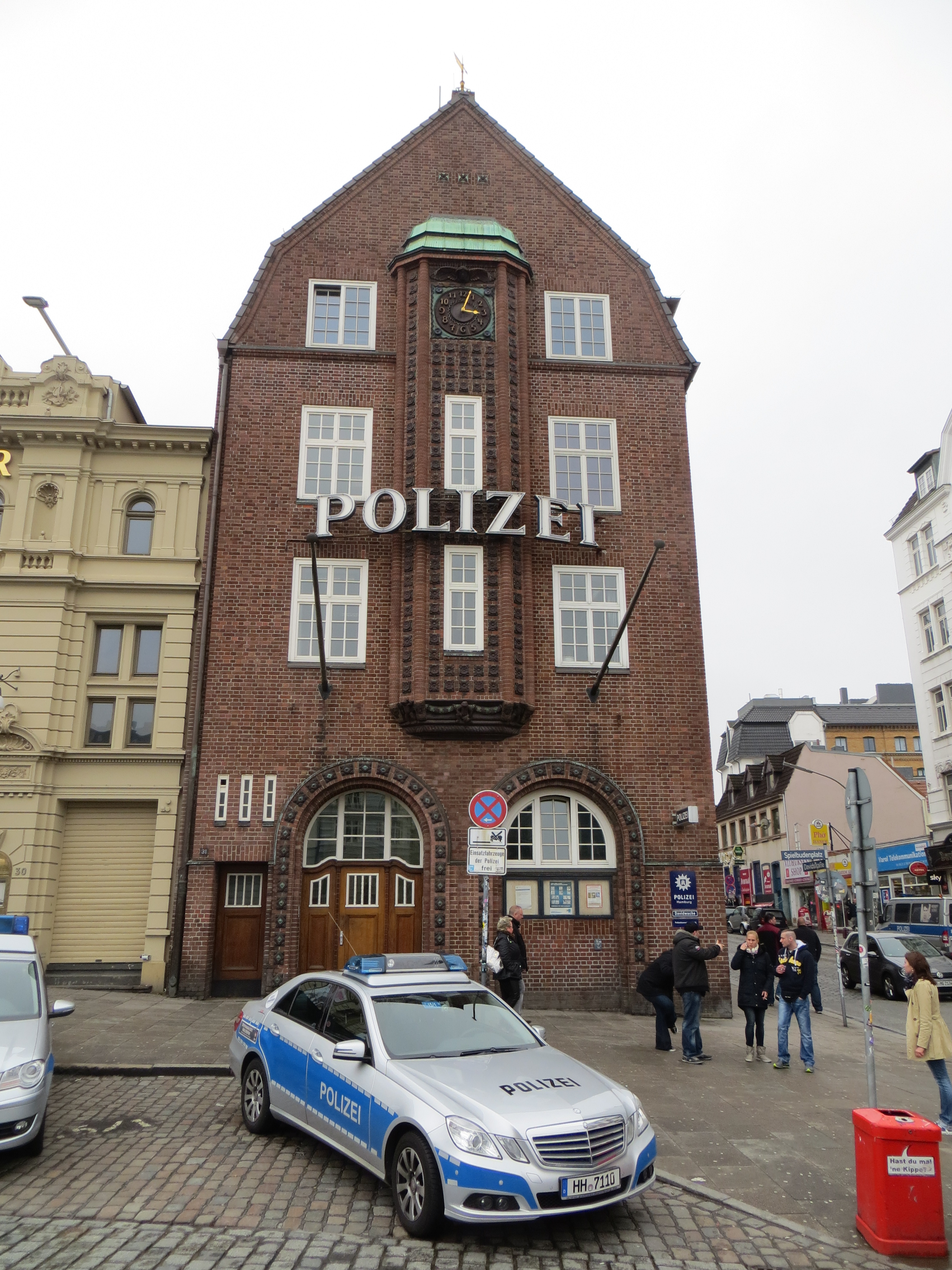 Davidwache